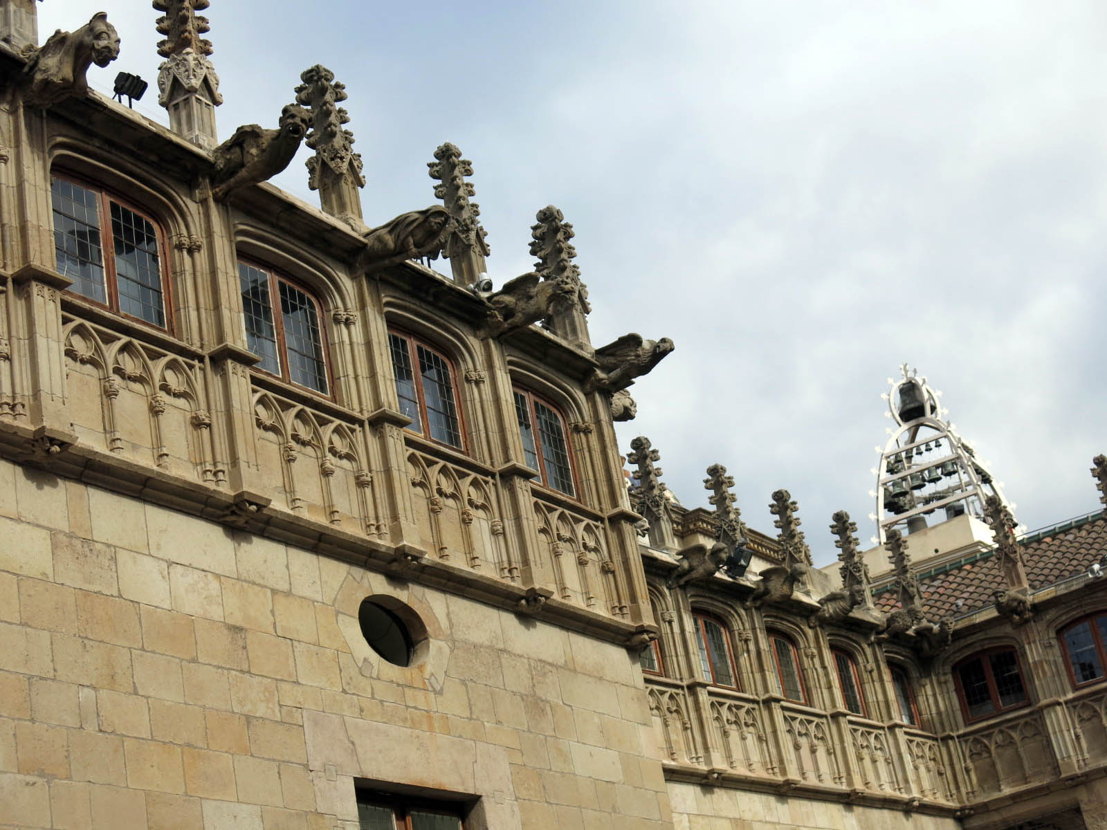 Palau de la Generalitat (Barcelona) Object location41° 22′ 58.01″ N, 2° 10′ 36.01″ E